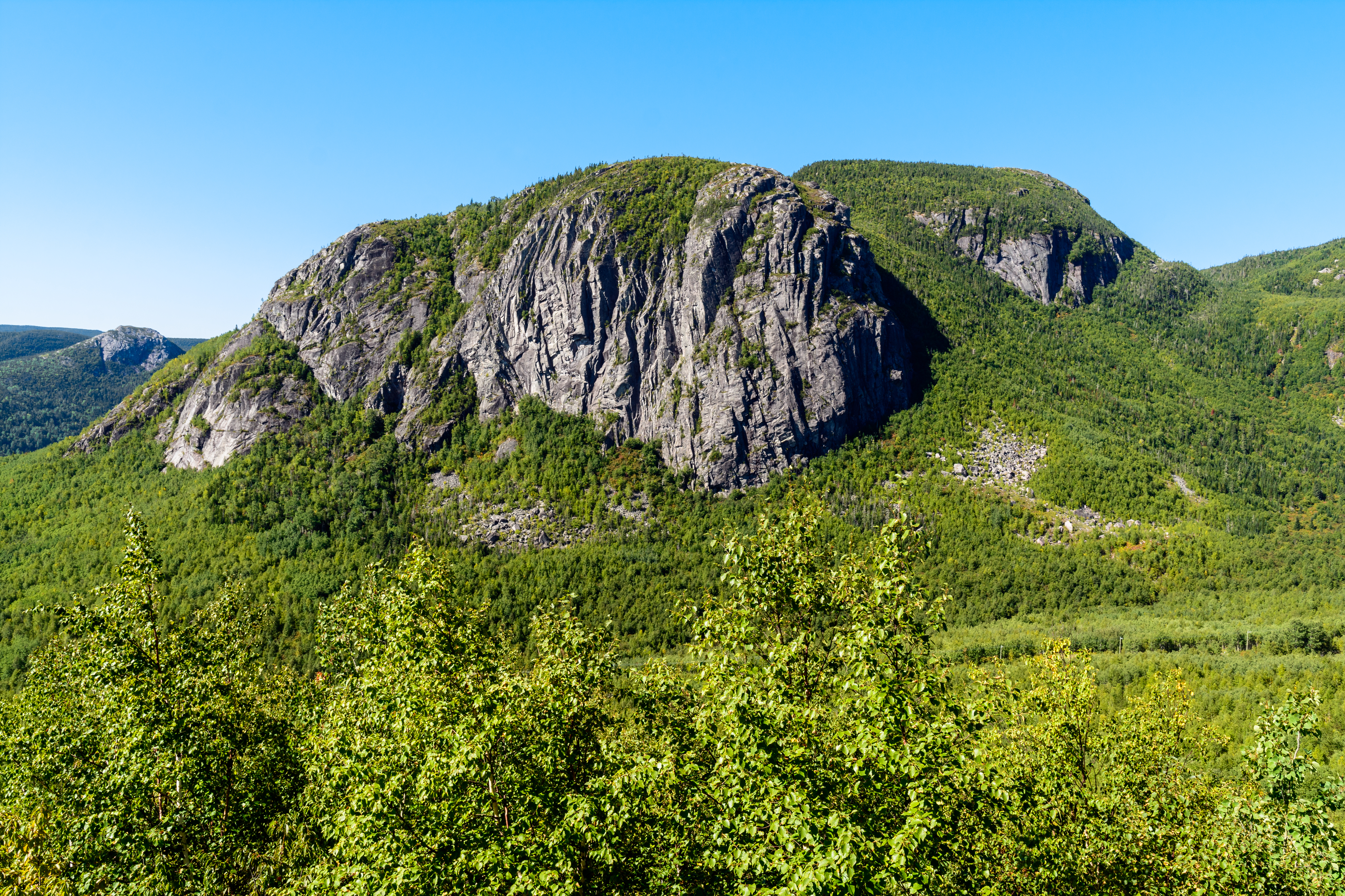 Parc national des Grands-Jardins, Canada